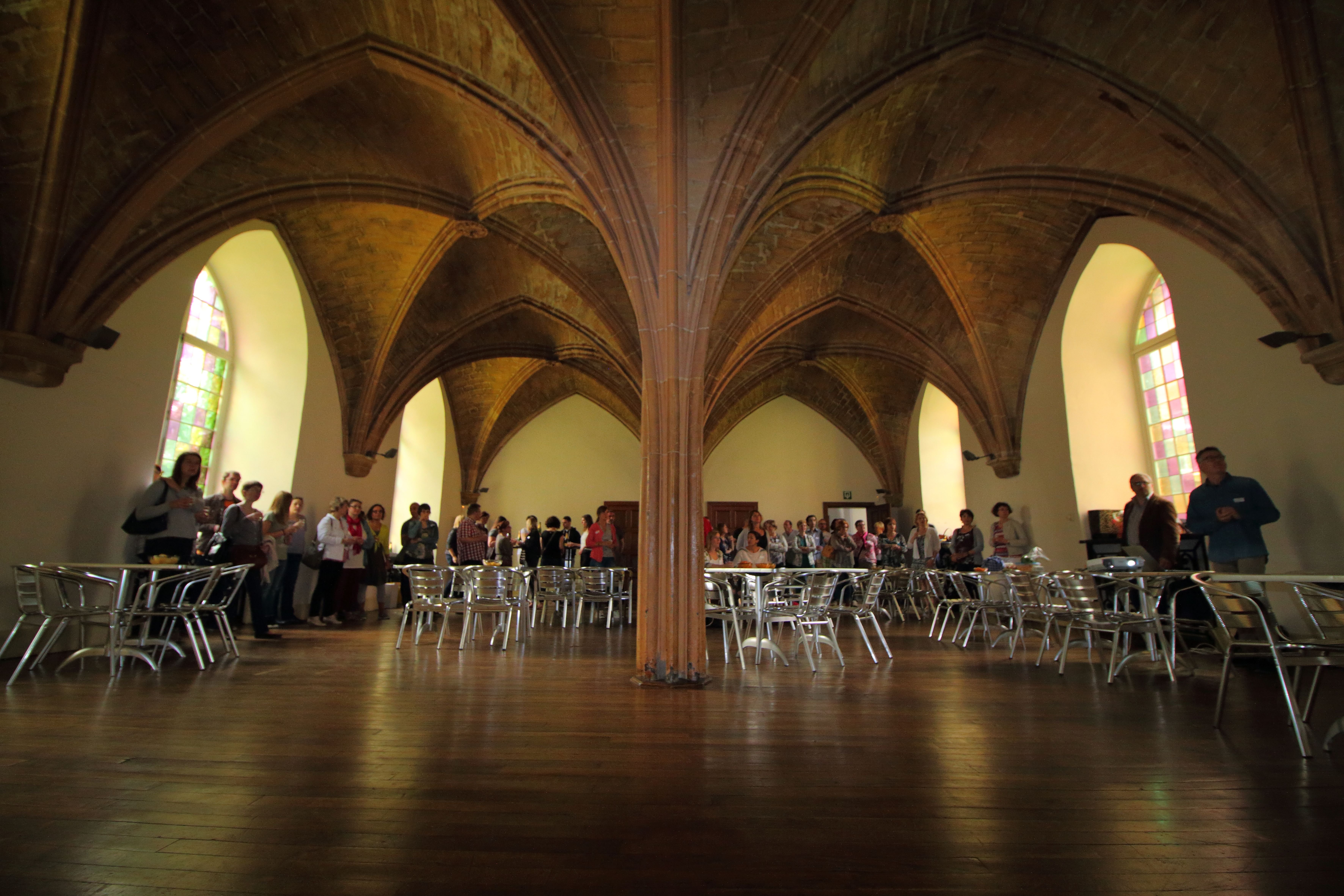 Salle capitulaire du couvent des Ecoliers à Liège